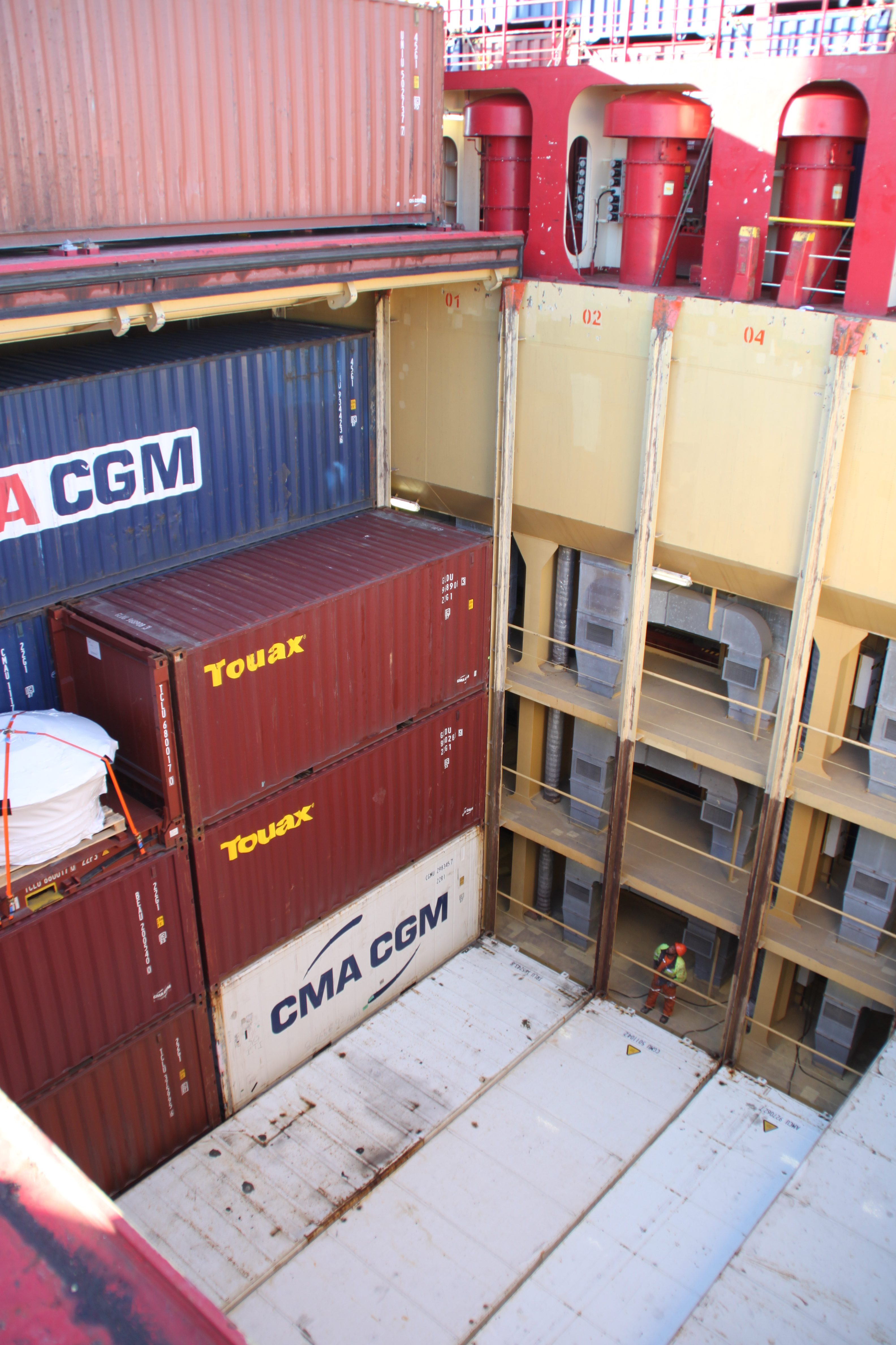 Alexander B im Hafen Helsingborg